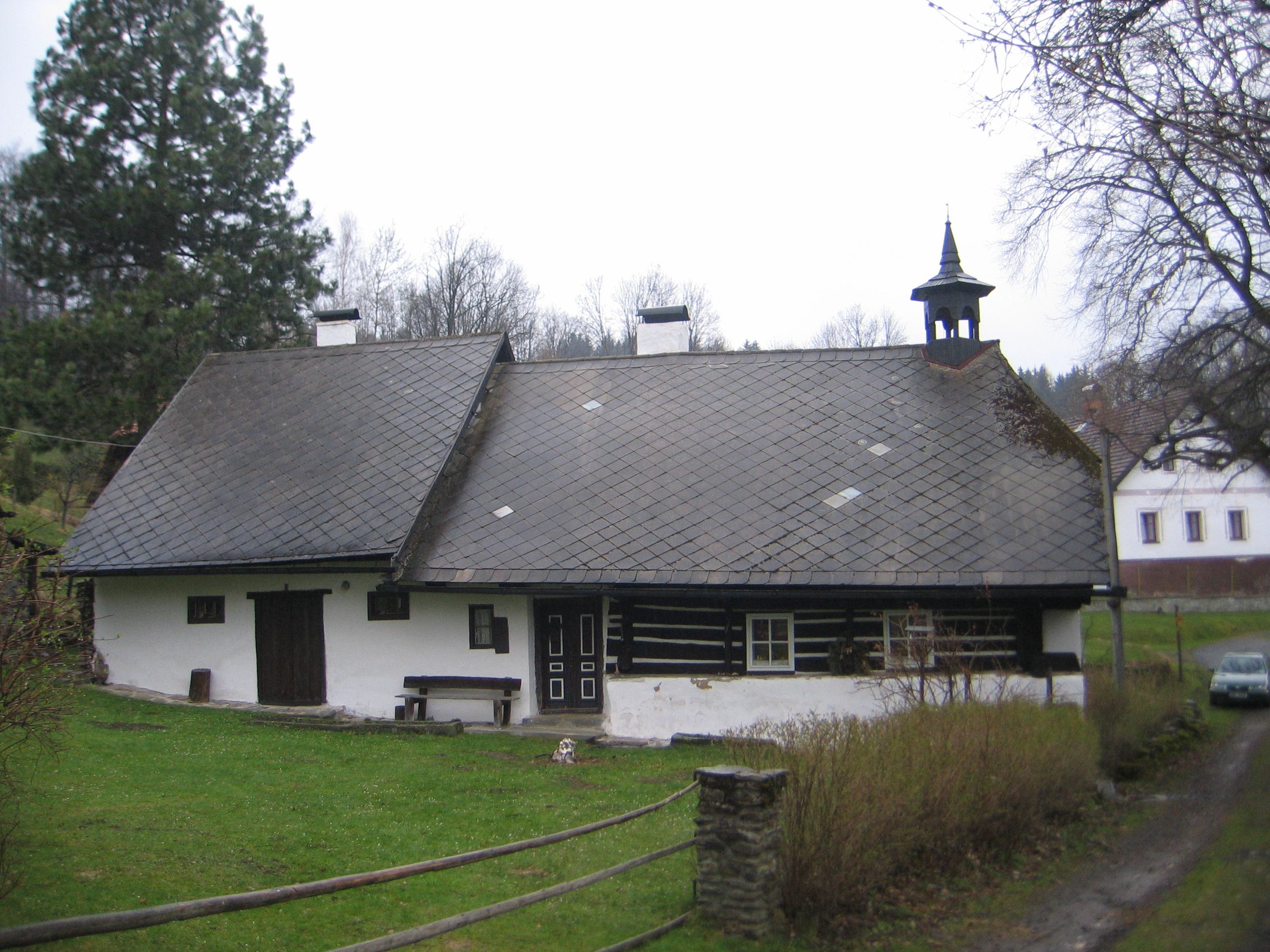 Venkovská usedlost (Zahrádka), J část obce při silnici 22, Zahrádka